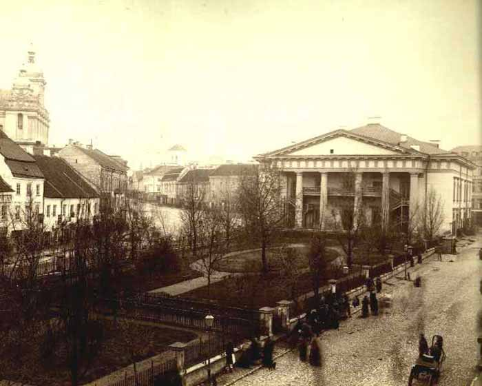 Didžioji g., Didžioji g. 24, Didžioji g. 26, Didžioji g. 28, Didžioji g. 30, Didžioji g. 31, Didžioji g. 32, Didžioji g. 33, Didžioji g. 35, Didžioji g. 37, Didžioji g. 39, Vokiečių g.